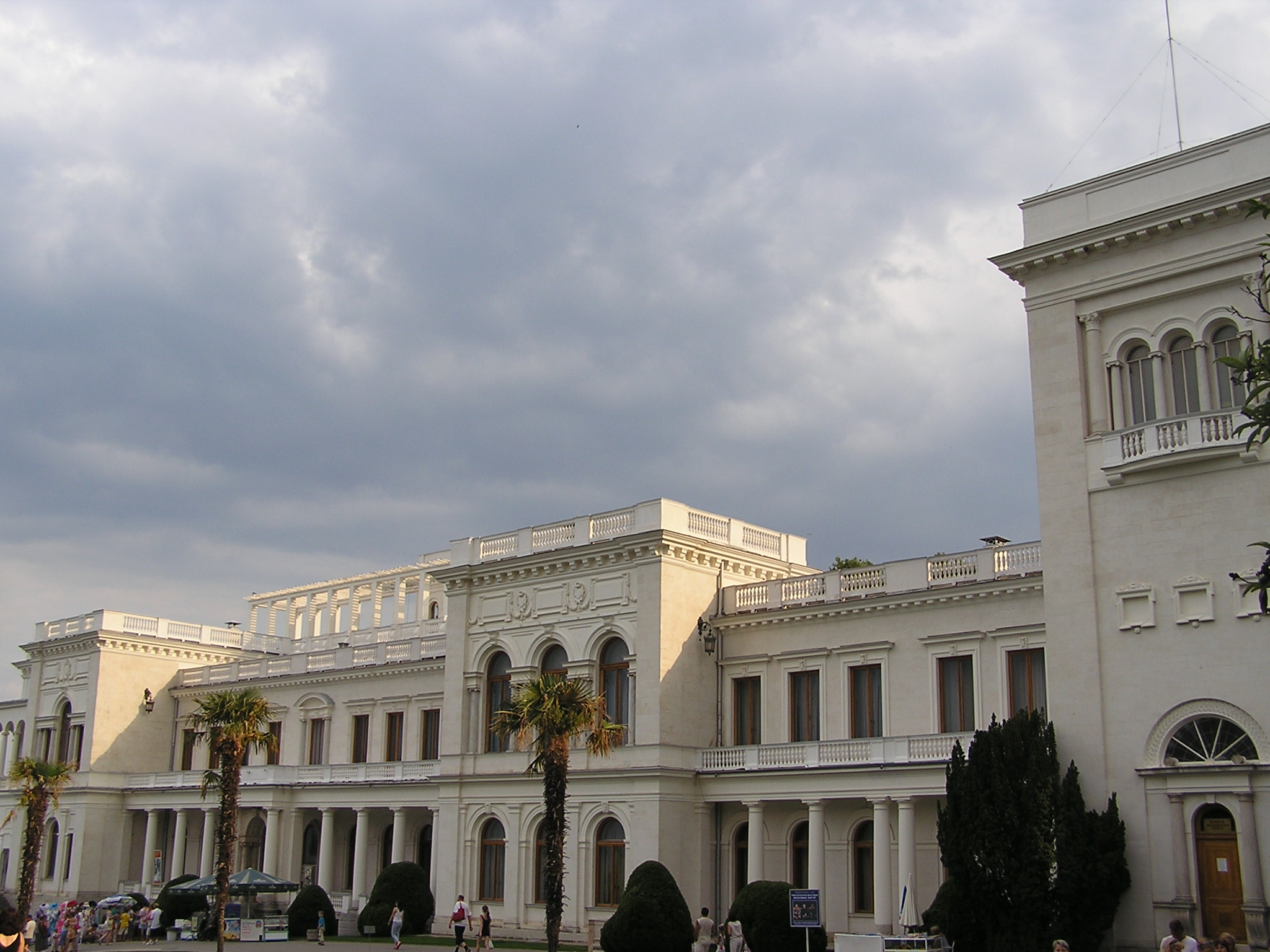 Ливадийский дворец